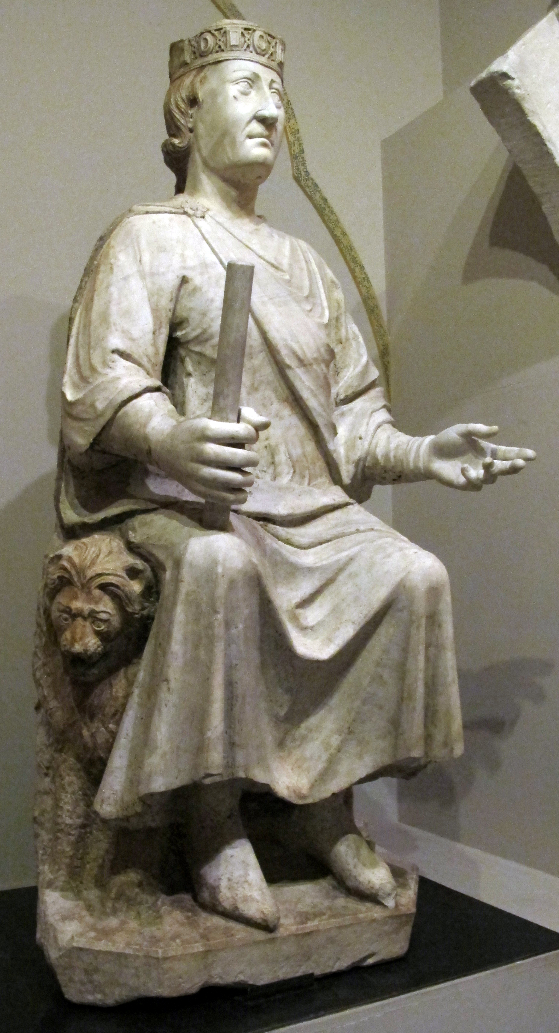 Collezione dei Musei Capitolini